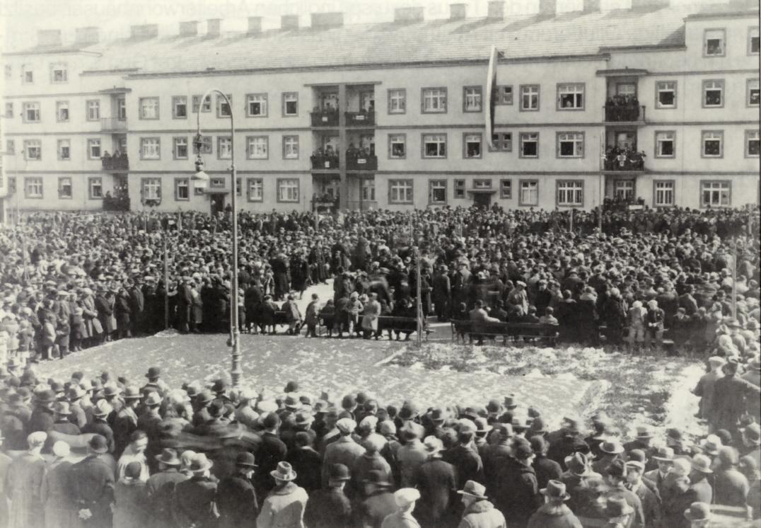 Eröffnung des Theerhofes in Wien-Meidling, 1930